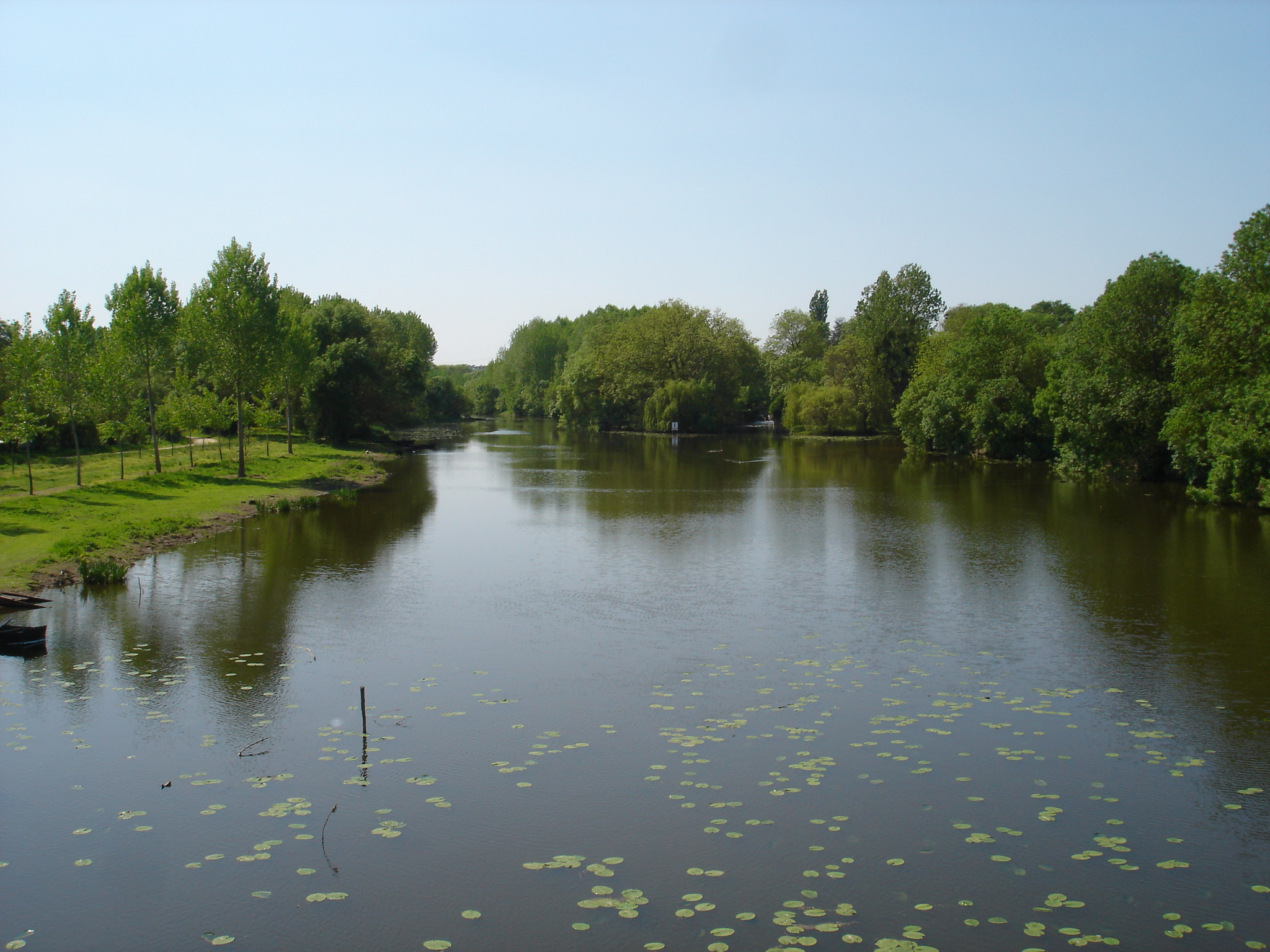 Le Thouet en aval de Montreuil-Bellay près de Saumoussay